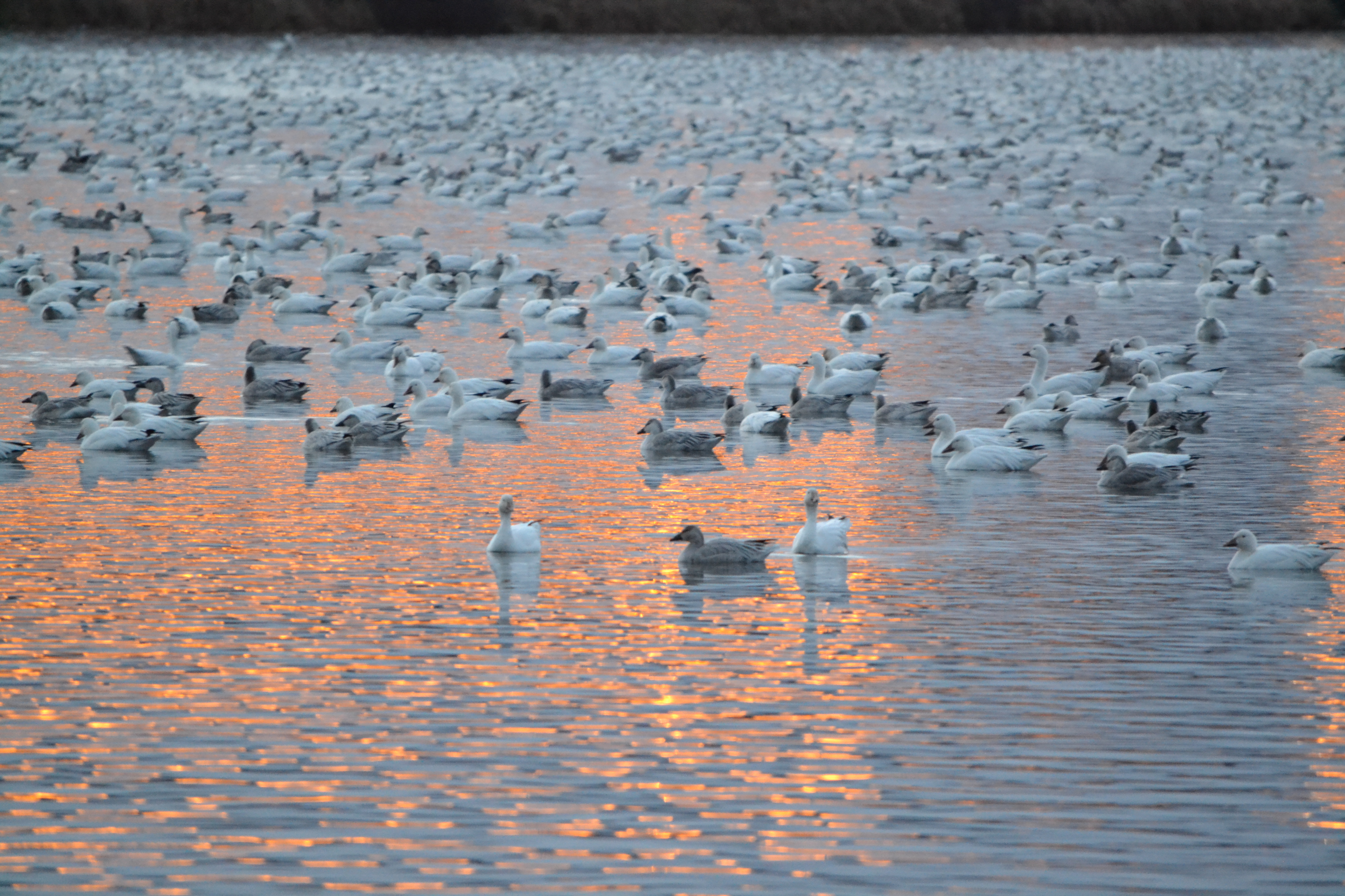 Oies blanches sur l'étang Burbank à Danville au Québec